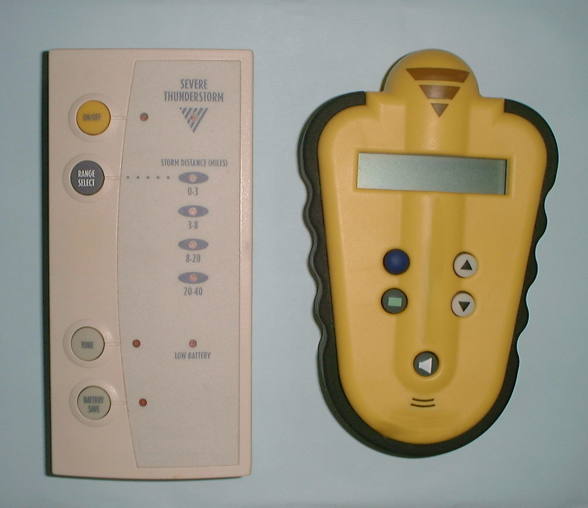 携帯用雷検知器。